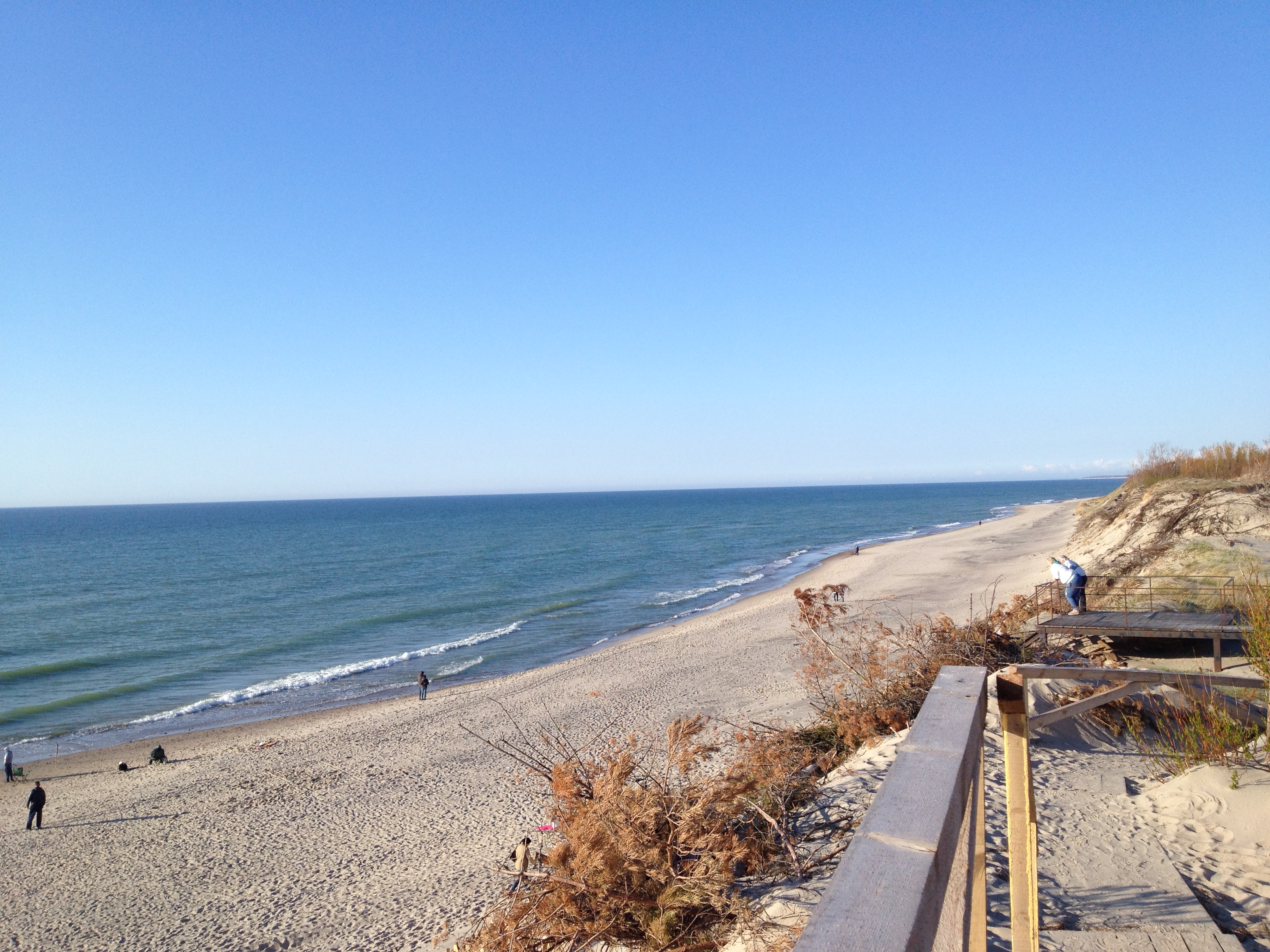 Балтийская коса, Балтийский район This image is related to the protected area of Russia number 3910015